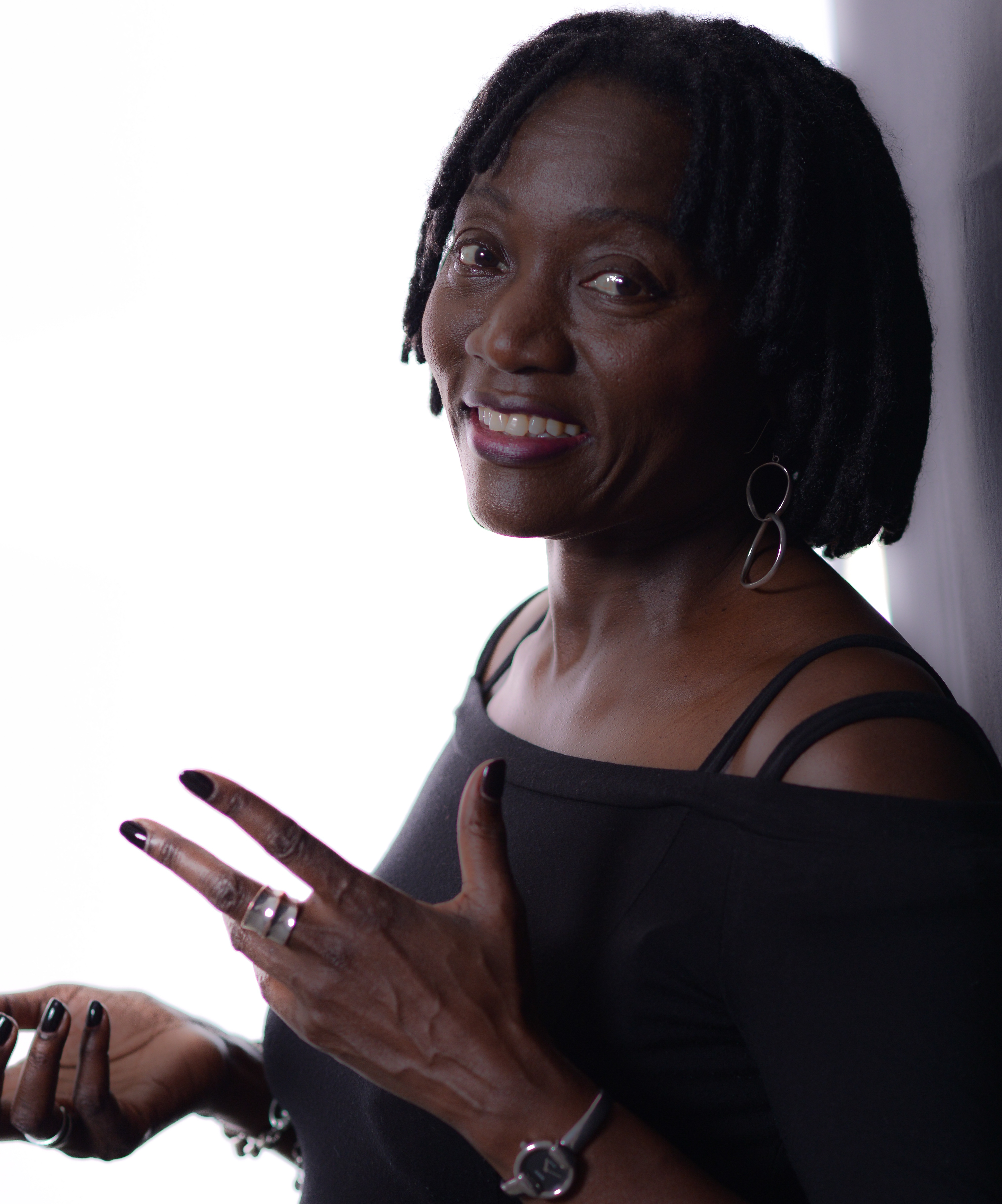 Offizielles Pressefoto 2016 Kredit: Elke Pouchet SH Management